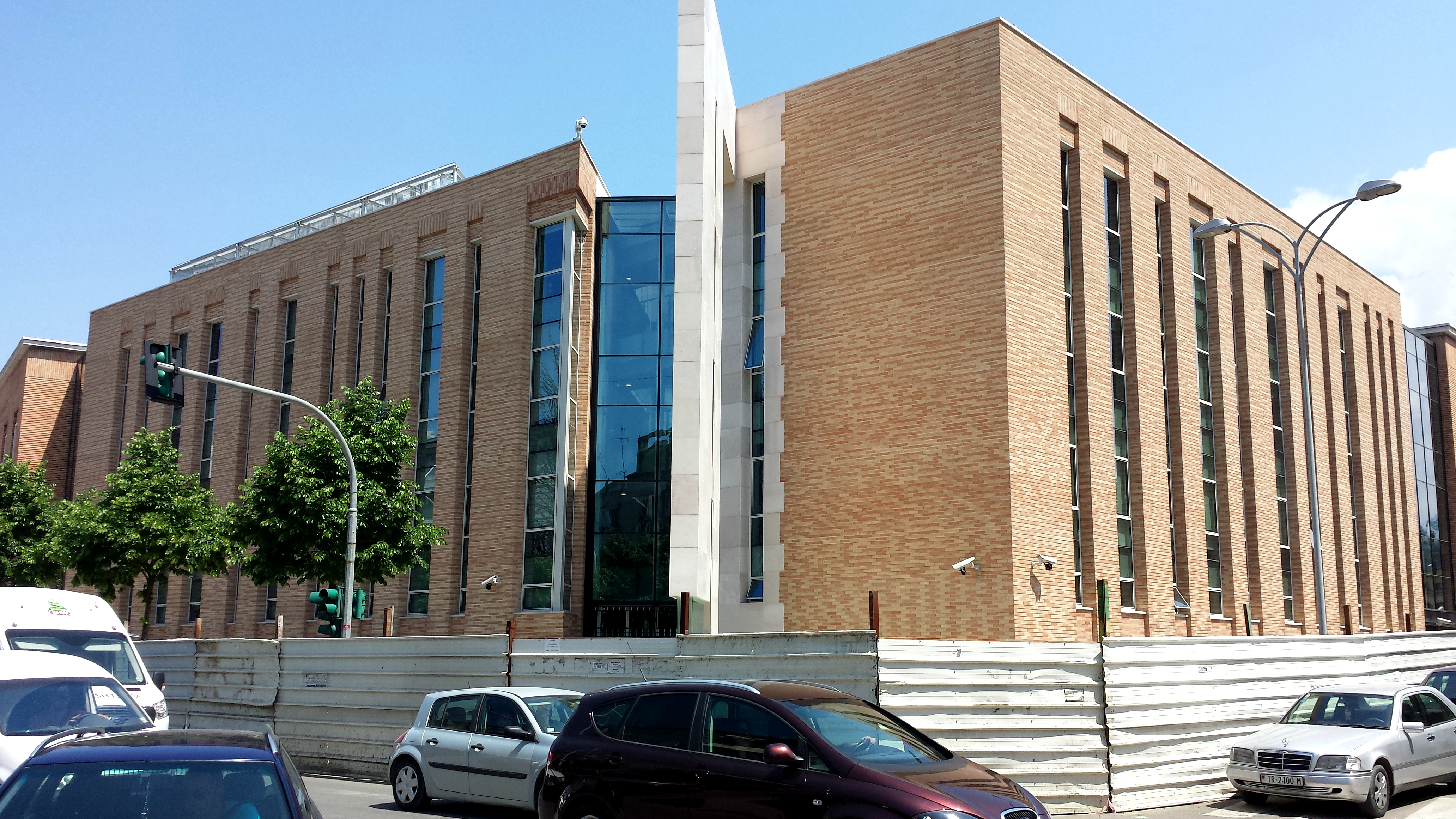 Banka e Shtetit Shqipëtar